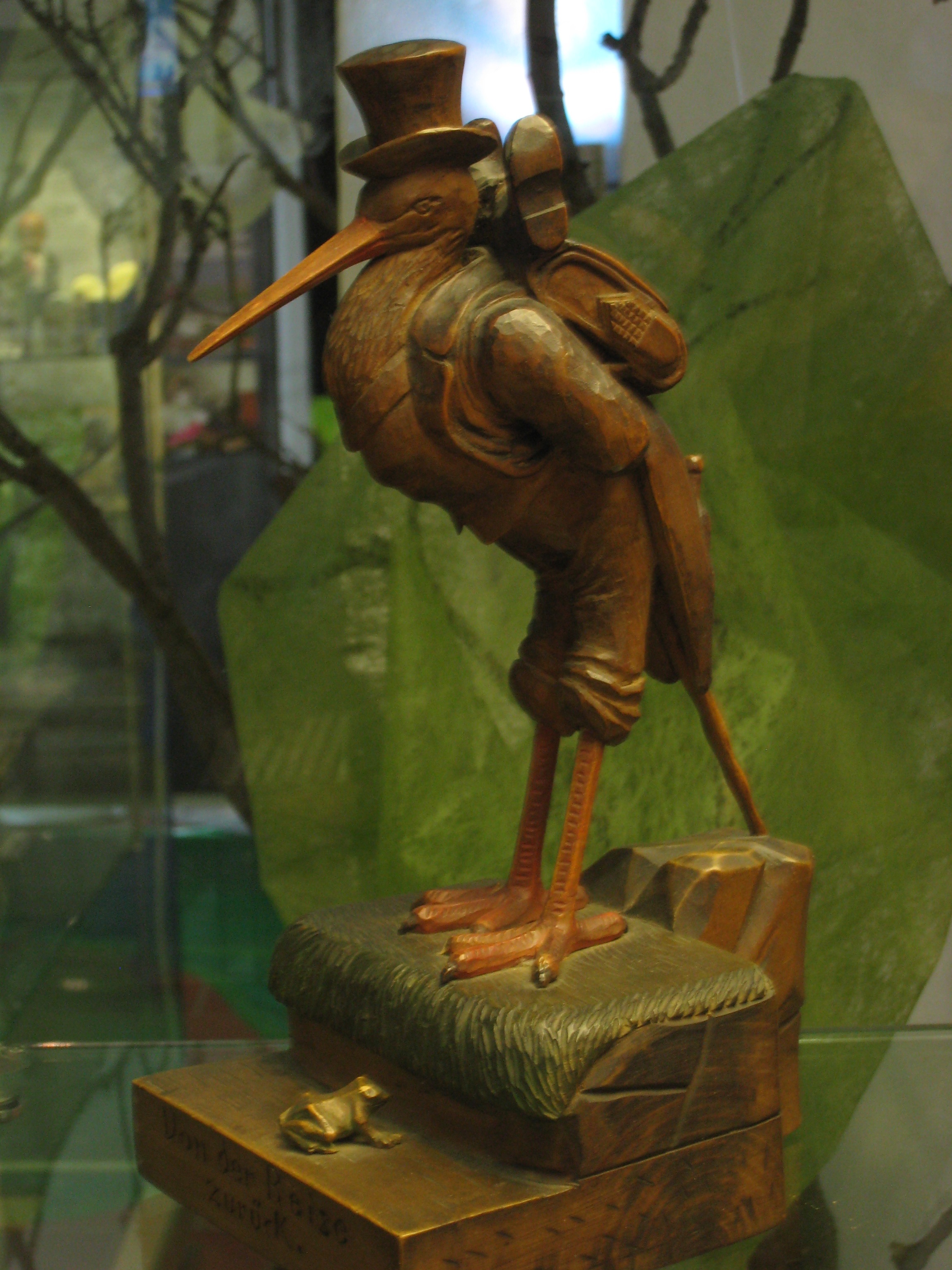 Wandervogel bei der Heimkehr, Schnitzerei